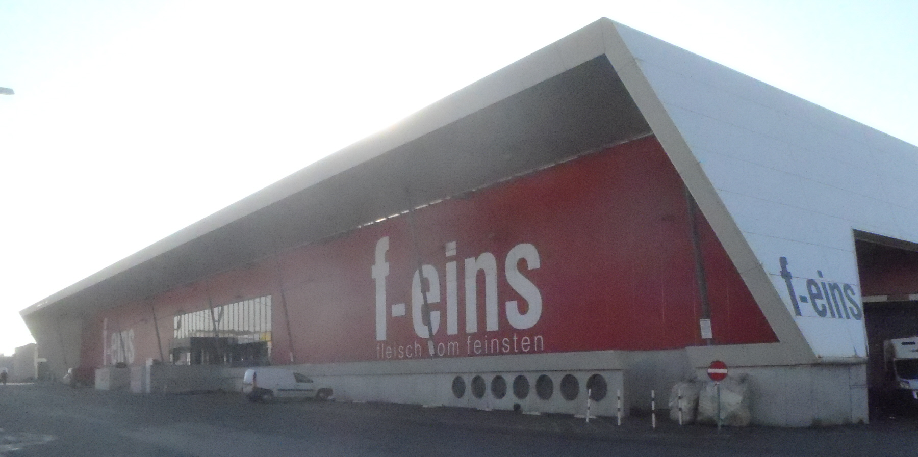 Fleischzentrum f-eins auf dem Großmarkt Inzersdorf in Wien